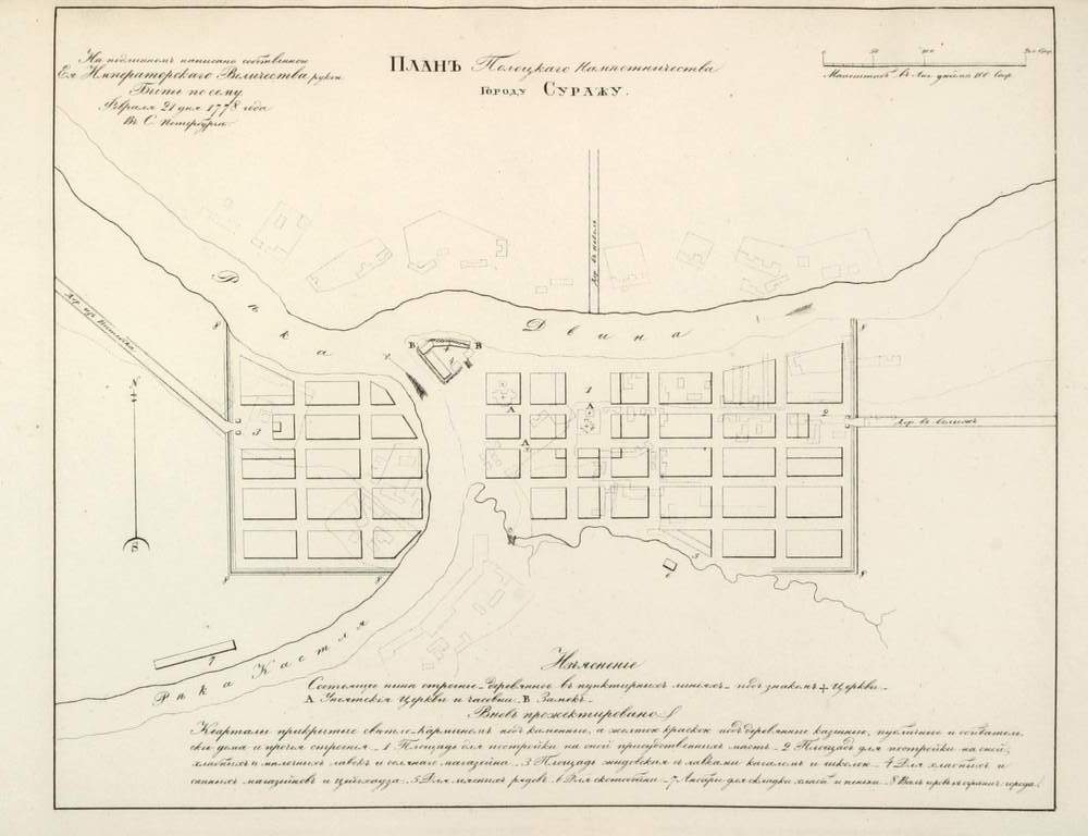 Беларуская (тарашкевіца): Сураж (Suraž). Плян места